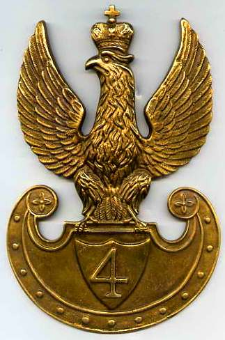 Orzełek 4 Pułku Piechoty Legionów